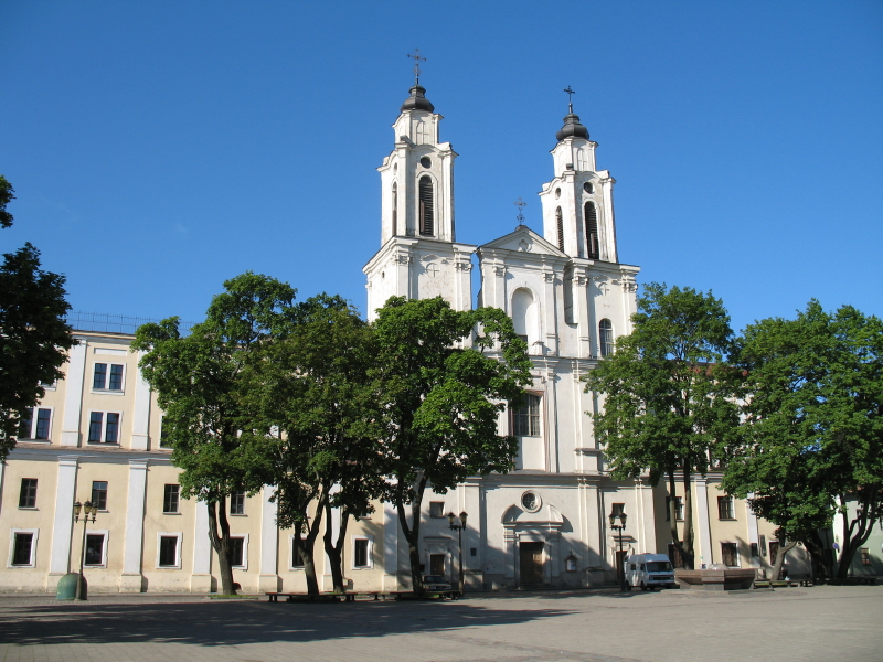 Šv. Pranciškaus Ksavero (Jėzuitų) bažnyčia, Kaunas.